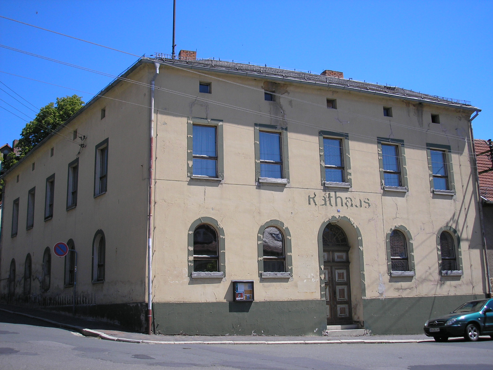 ehemaliges Rathaus von Ranis (Saale-Orla-Kreis, Thüringen)